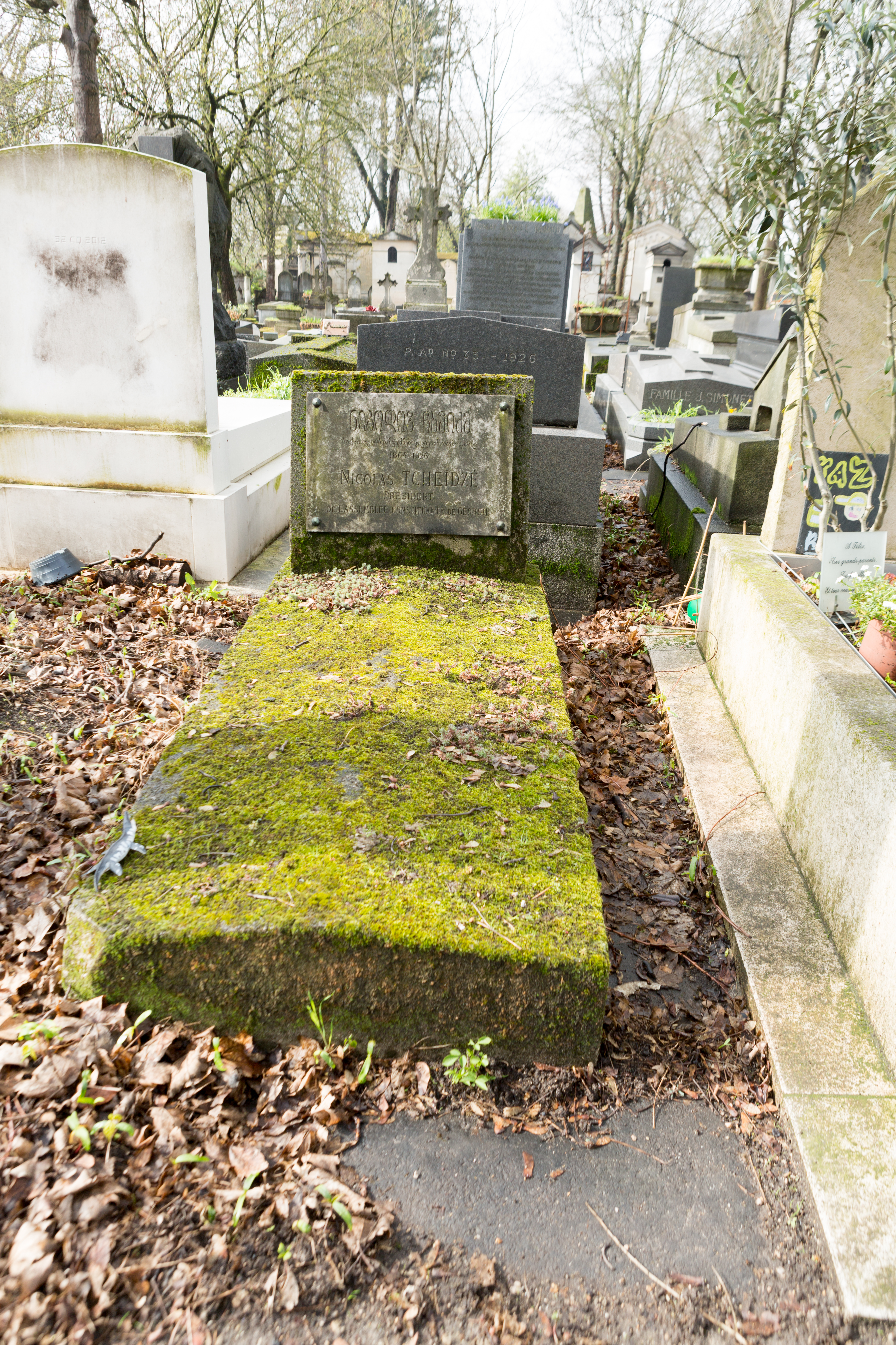 Sépulture de Nicolas Tchkhéidzé (1864-1926), social-démocrate russe et géorgien du courant menchevik. Issu d'une famille aristocratique, il est le chef de l'opposition au tsar Nicolas II au sein des 3e et 4e Douma russe (1907-1916), président du Comité exécutif du Soviet de Petrograd (février à octobre 1917), président de l'Assemblée parlementaire transcaucasienne (1918), président des différentes assemblées parlementaires géorgiennes (1918-1921), interlocuteur de Georges Clemenceau, Lloyd George, Thomas Woodrow Wilson et Emanuele Orlando à la Conférence de paix de Paris (1919) au titre de la Géorgie, brillant orateur en langue russe et en langue géorgienne, il est l'un des plus redoutables opposants au pouvoir tsariste et au pouvoir bolchévique du début du XXe siècle.